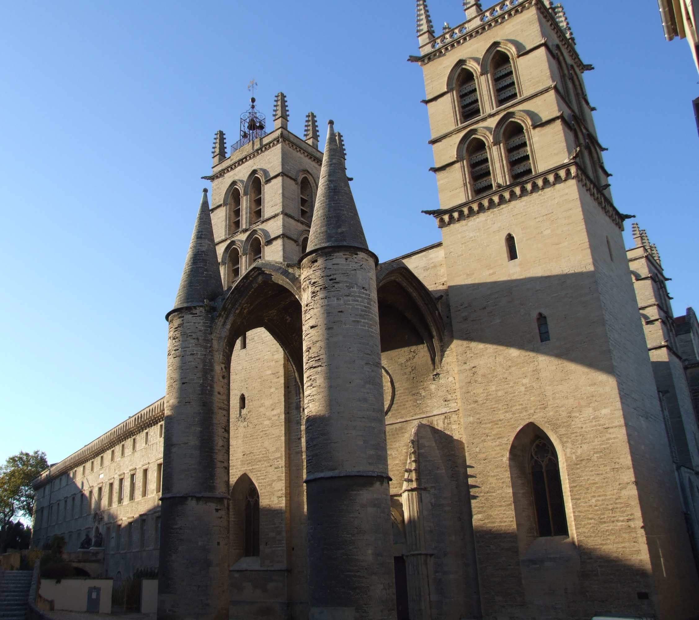 Cathédrale Saint-Pierre de Montpellier, Montpellier, Hérault, FRANCE